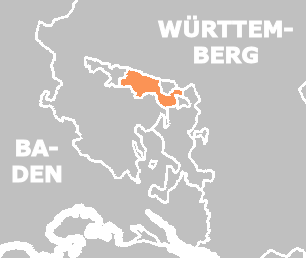 Hohenzollern-Hechingen in 1848